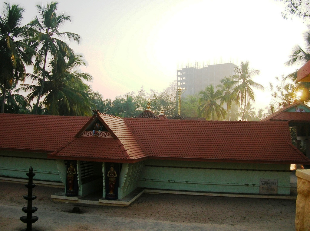 ശാസ്തമംഗലം മഹാദേവക്ഷേത്രം